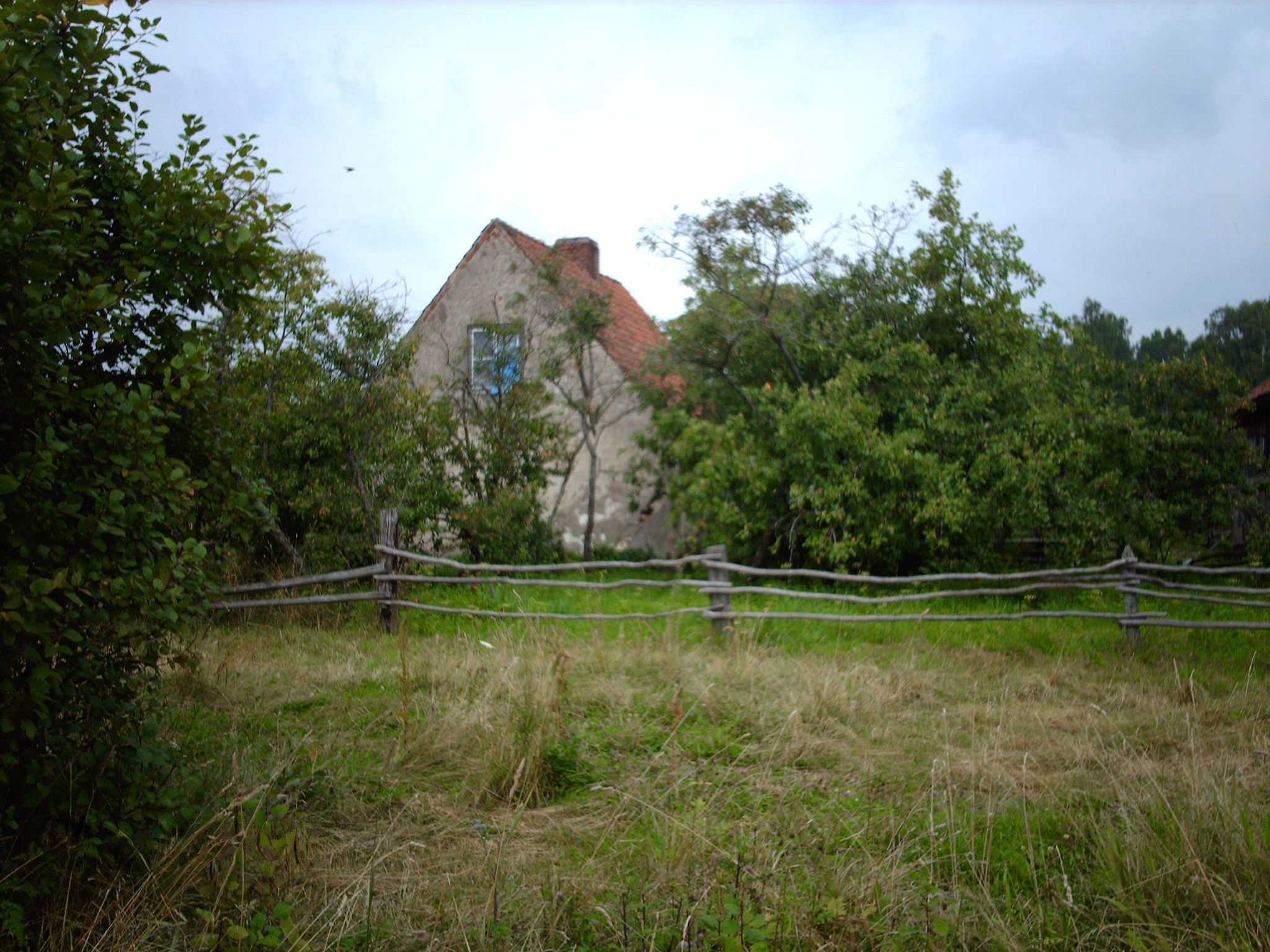 Novaya Derevnya in Kaliningrad region in Russia (Alt Gertlauken untill 1945)